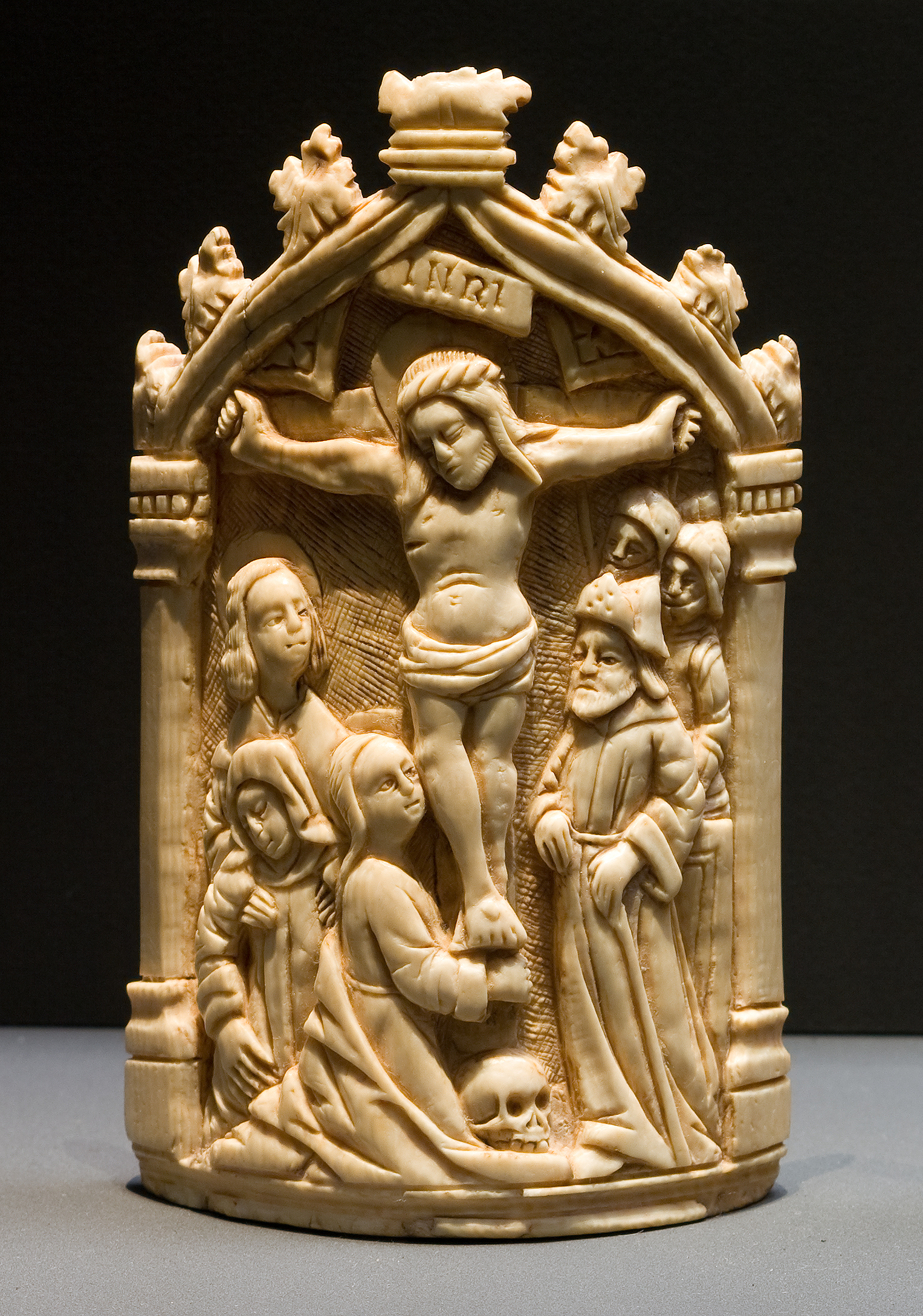 Paxtafel met kruisiging, Vlaanderen of Duitsland, 1500 - 1510. Tijdens de mis gaf men elkaar de vredeskus door de paxtafel te kussen en aan elkaar door te geven.